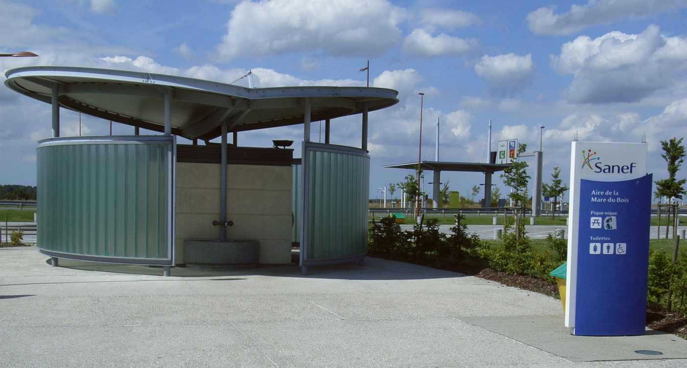 Sanef-Rastplatz mit Toilettenhaus an der A2, Frankreich